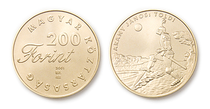 Arany János: Toldi, A magyar ifjúsági irodalom alakjai emlékpénzérme sor, rézötvözet, vert, 2001., Tervező: ifj. Szlávics László, Kibocsátó: Magyar Nemzeti Bank